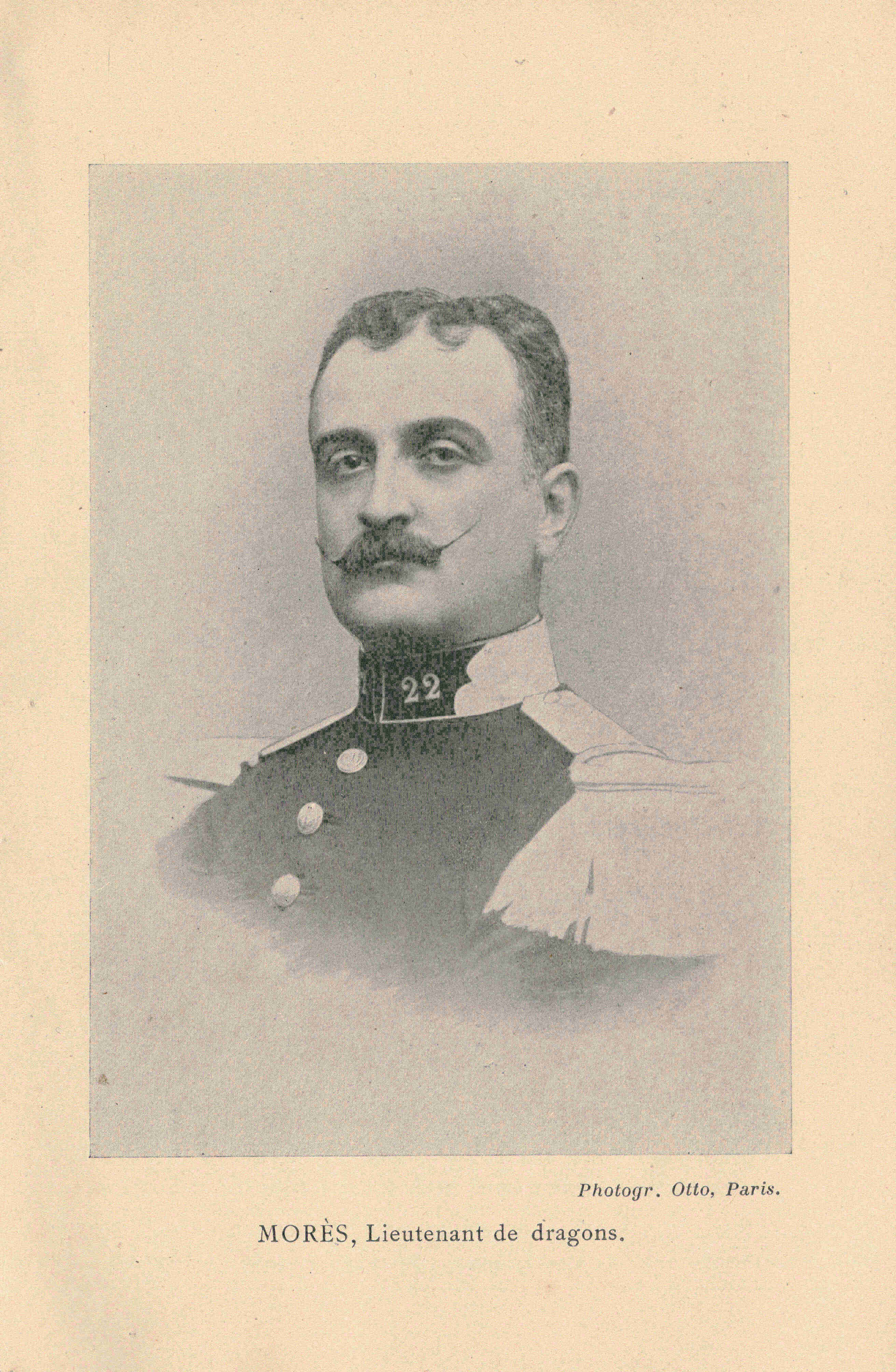 Antoine-Amédée-Marie-Vincent Manca-Amat de Vallombrosa , Marquis de Morès, (1858 - 1896), son portrait.